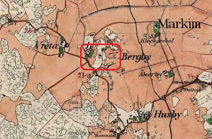 Bergby gård och kvarn (inom röd ram)